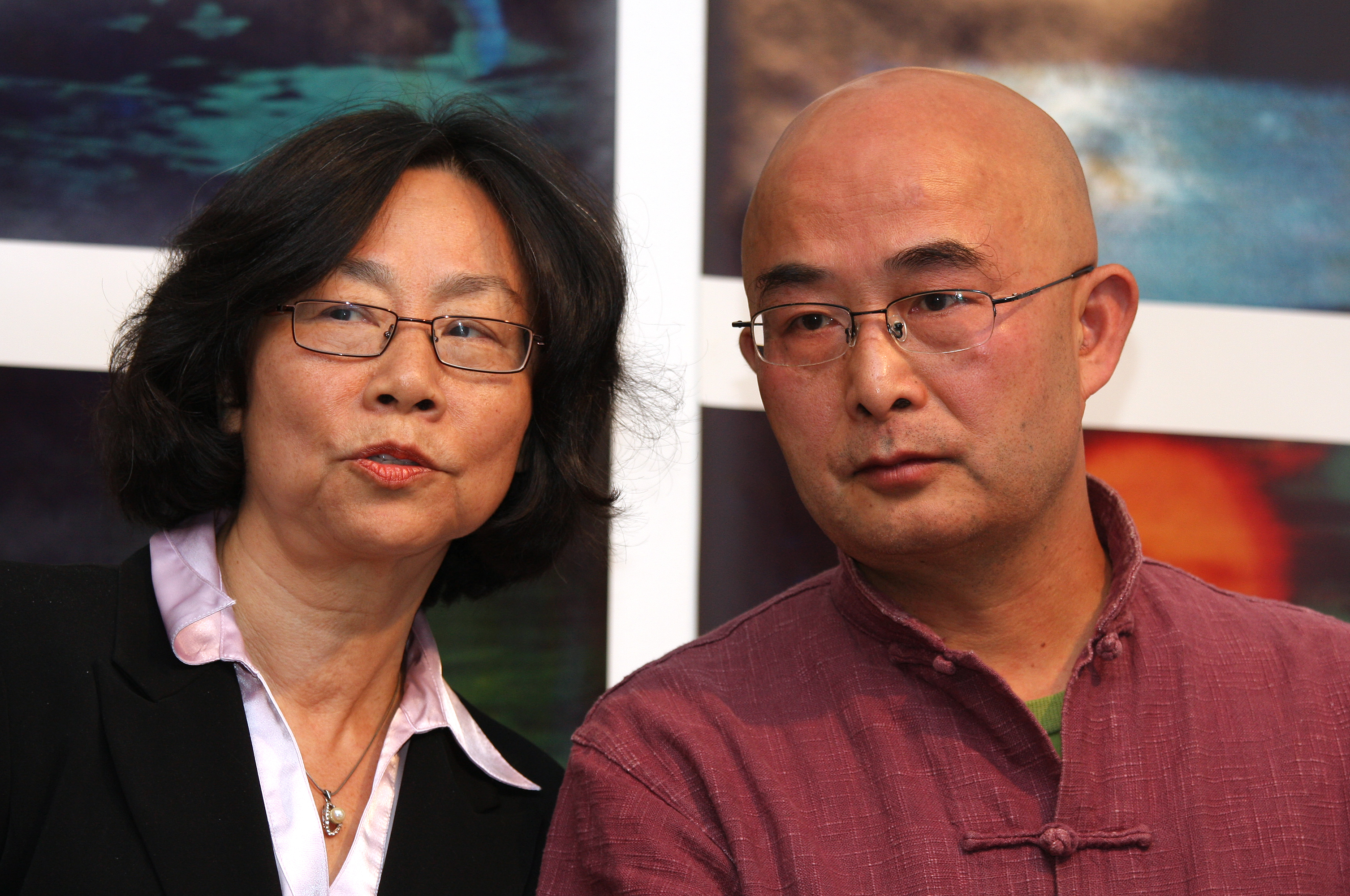 Tienchi Martin-Liao und Liao Yiwu bei einer Veranstaltung im Literaturhaus Köln